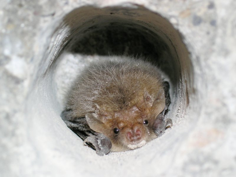 Braunes Langohr (Plecotus auritus) in einem Bohrloch im Winterqartier. Die Ohren sind unter der Flughaut eingeklappt. Der Tragus bleibt aber zu sehen und erscheint wie ein Ohr.